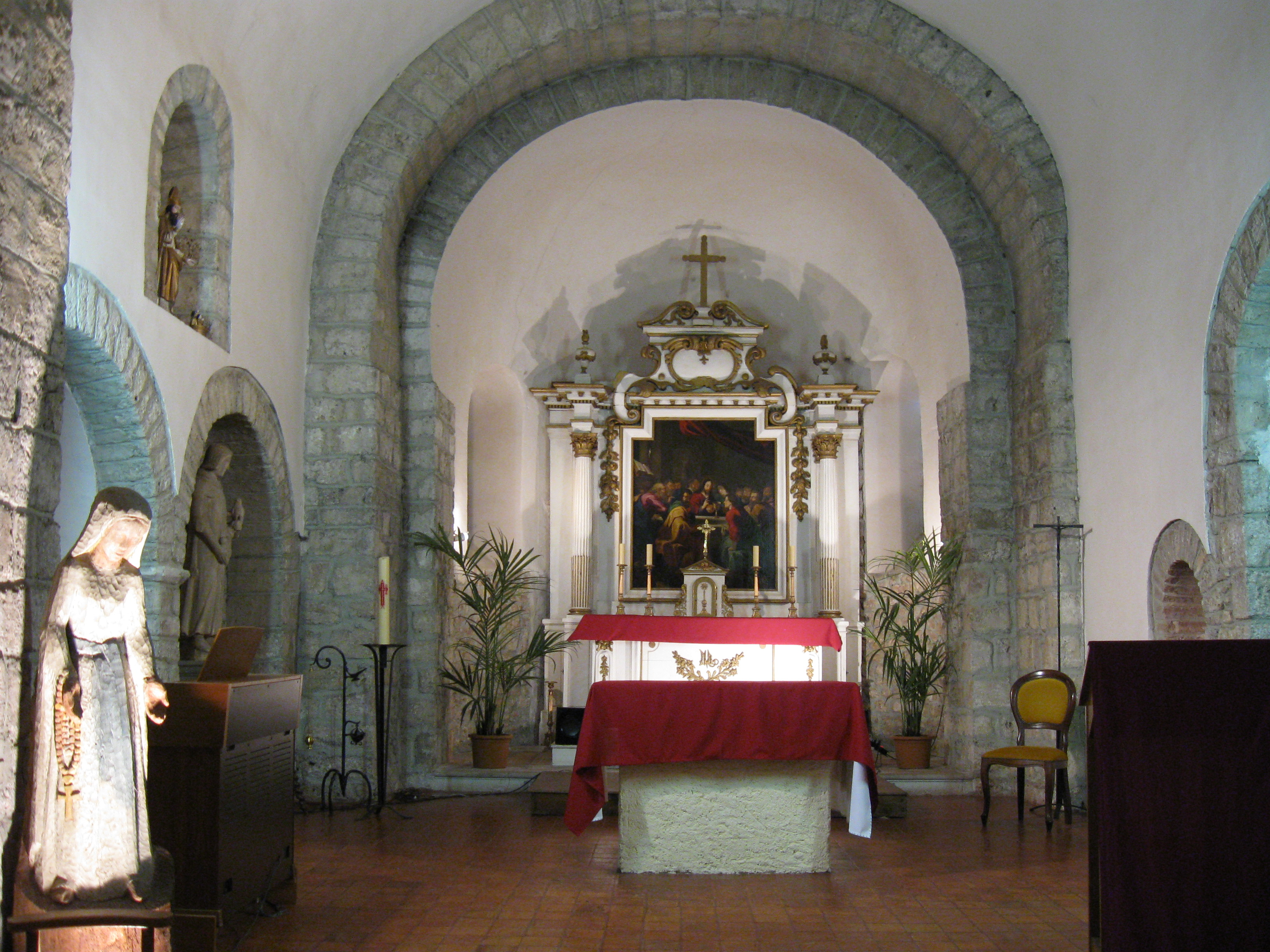 Maître-autel et retable de l'église Saint-Mammès. A gauche de l'autel, la statue de Saint Mammès. (commune de Saint-Mammès, Seine-et-Marne, région Île-de-France).